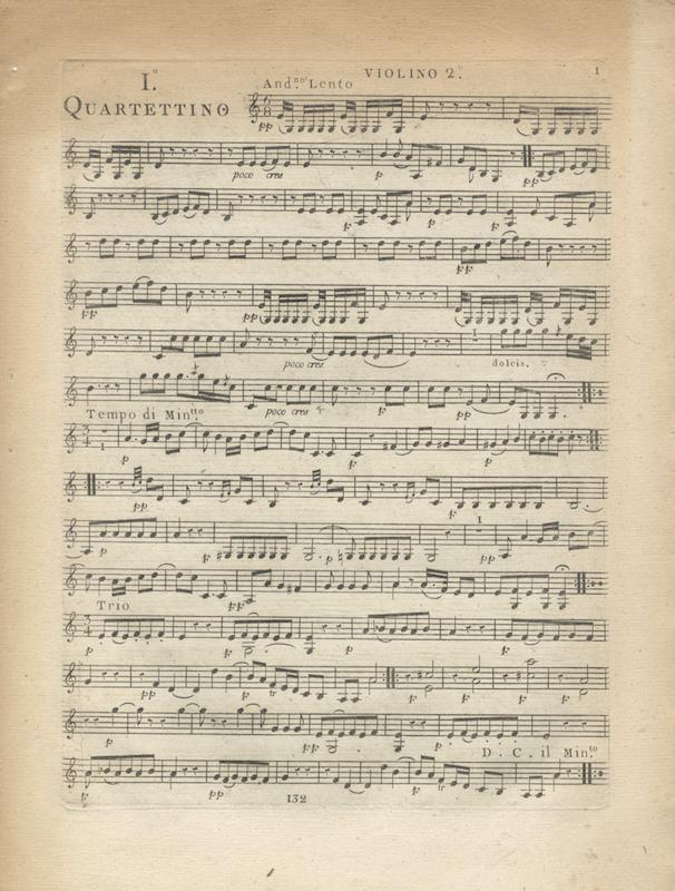 Quatuors à cordes op.53 (G.236-241) de 1796 édités par Pleyel en 1798 comme oeuvre 40.